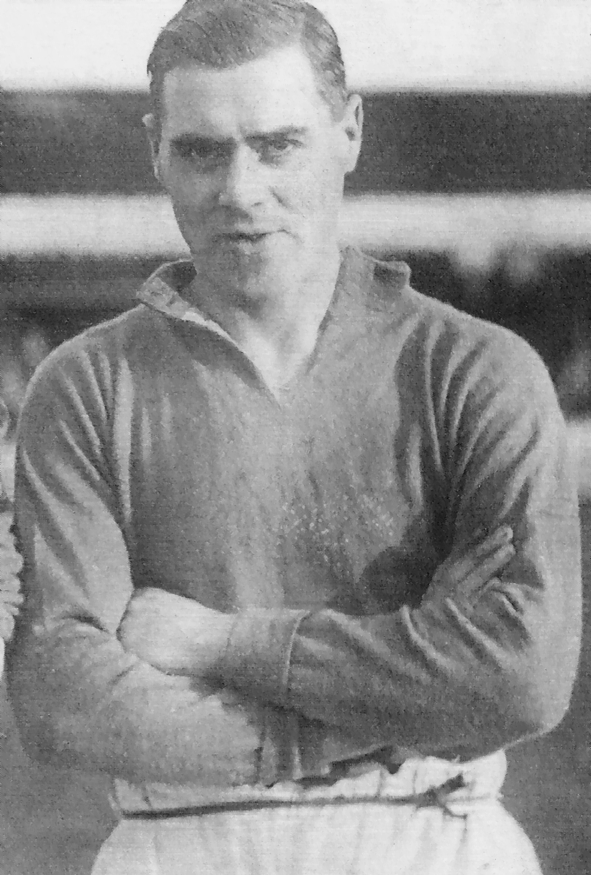 Teddy Barton